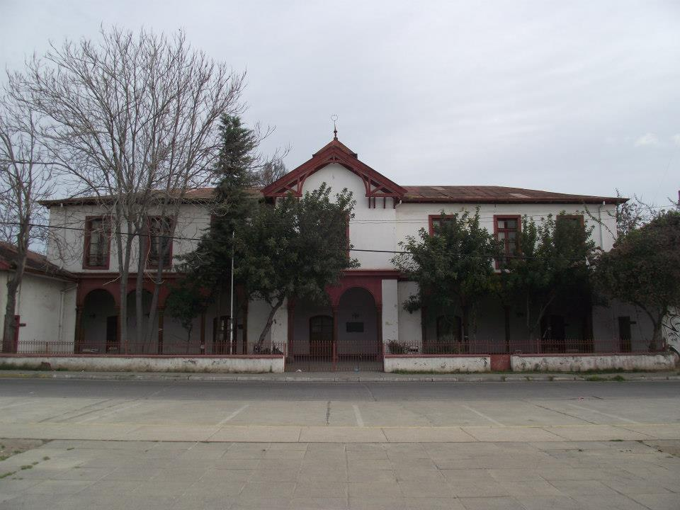 casa que actualmente se ocupa como Municipalidad de la comuna Pedro Aguirre Cerda.